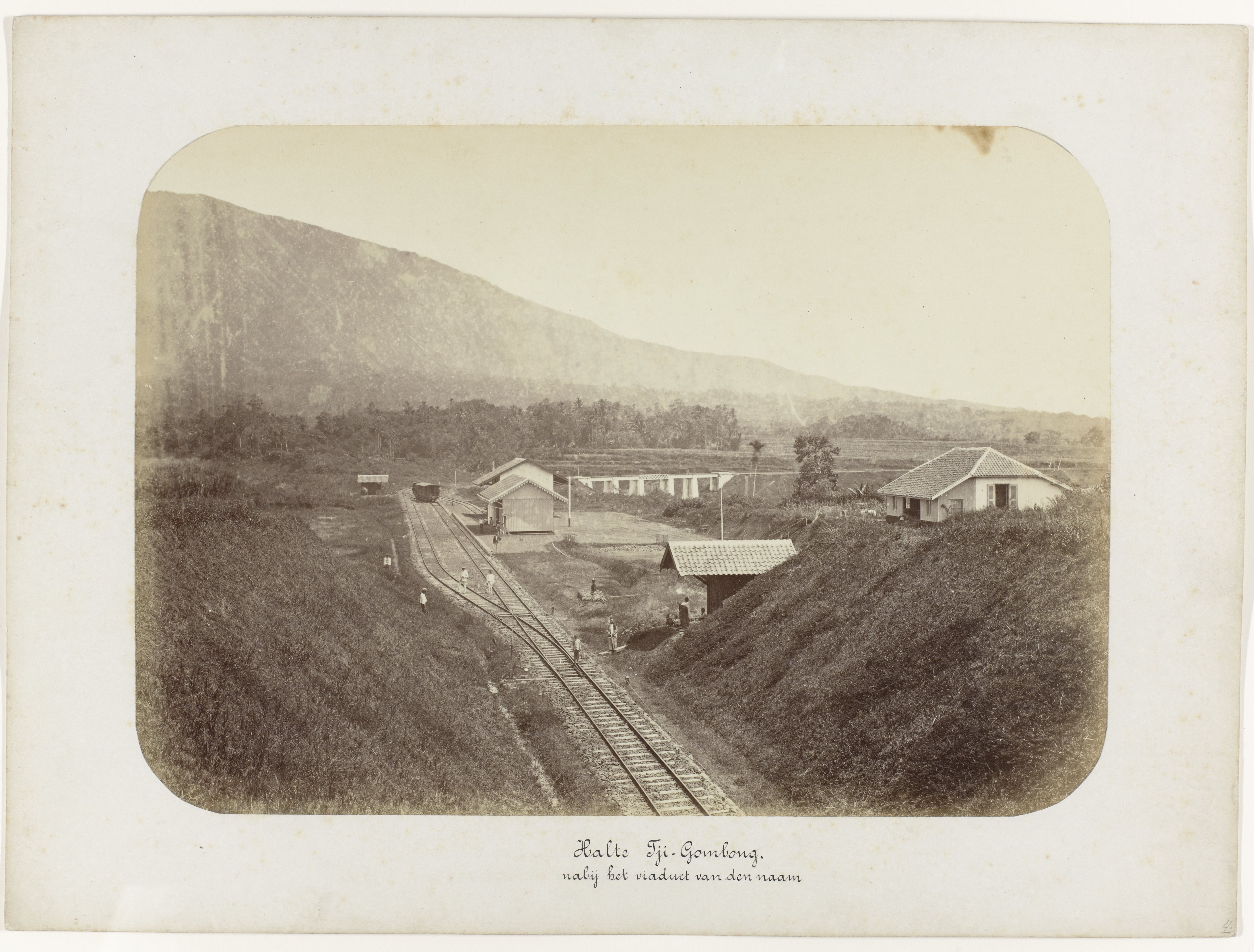 IdentificatieTitel(s): Halte Tji-Gombong, / nabij het viaduct van den naam (titel op object)Staatsspoorwegen op Java (serietitel)Objecttype: foto Objectnummer: NG-1988-26-46Omschrijving: De spoorweg met de halte Tji-Gombong, in de verte bergen. Onderdeel van een groep van 62 foto's in een doos met het opschrift "Staatsspoorwegen op Java" uit 1888.VervaardigingVervaardiger: fotograaf: anoniemPlaats vervaardiging: JavaDatering: 1880 - 1888Fysieke kenmerken: albuminedrukMateriaal: fotopapier Techniek: albuminedrukAfmetingen: foto: h 227 mm × b 320 mmkarton: h 300 mm × b 402 mmOnderwerpWanneer: 1880 - 1888Waar: JavaVerwerving en rechtenVerwerving: aankoop 30-aug-1988Copyright: Publiek domein